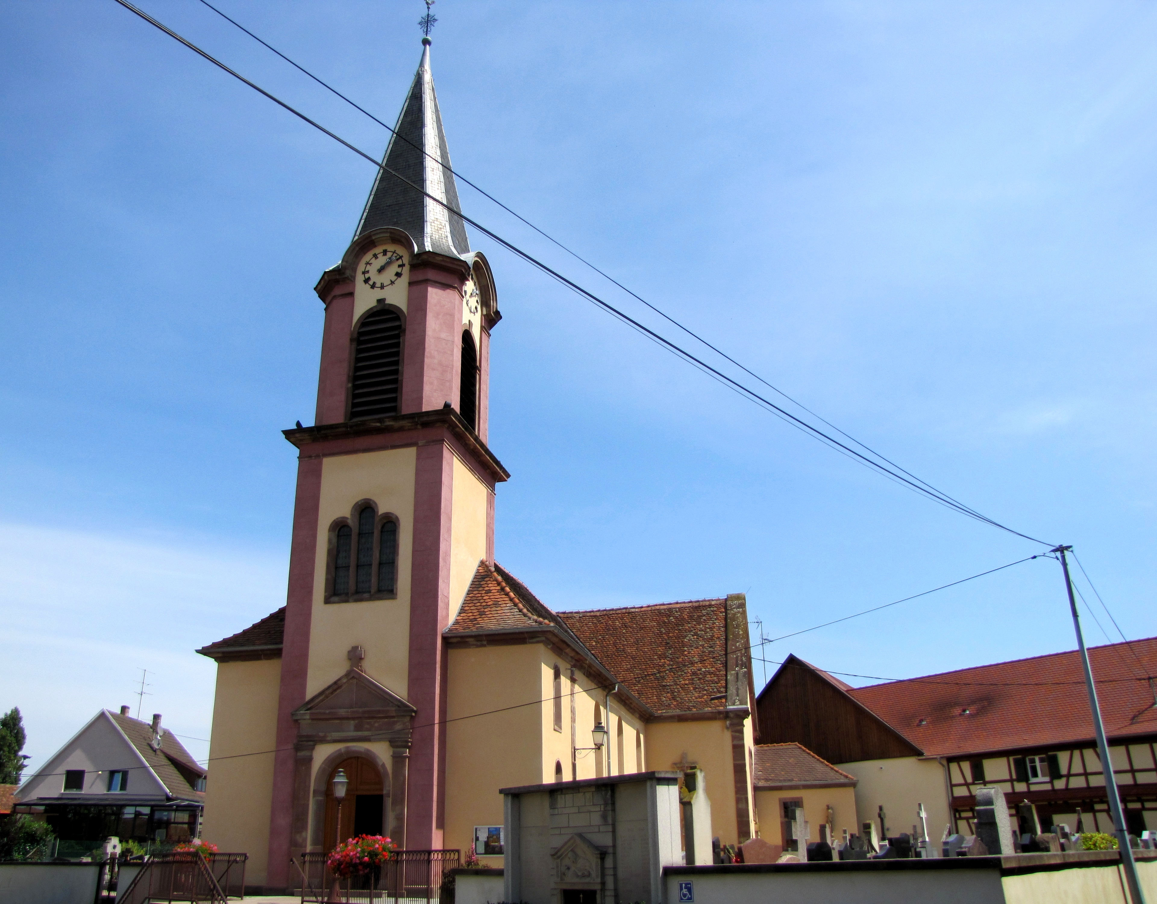 Alsace, Bas-Rhin, Schaeffersheim, Église Saint-Léger (IA00023421).